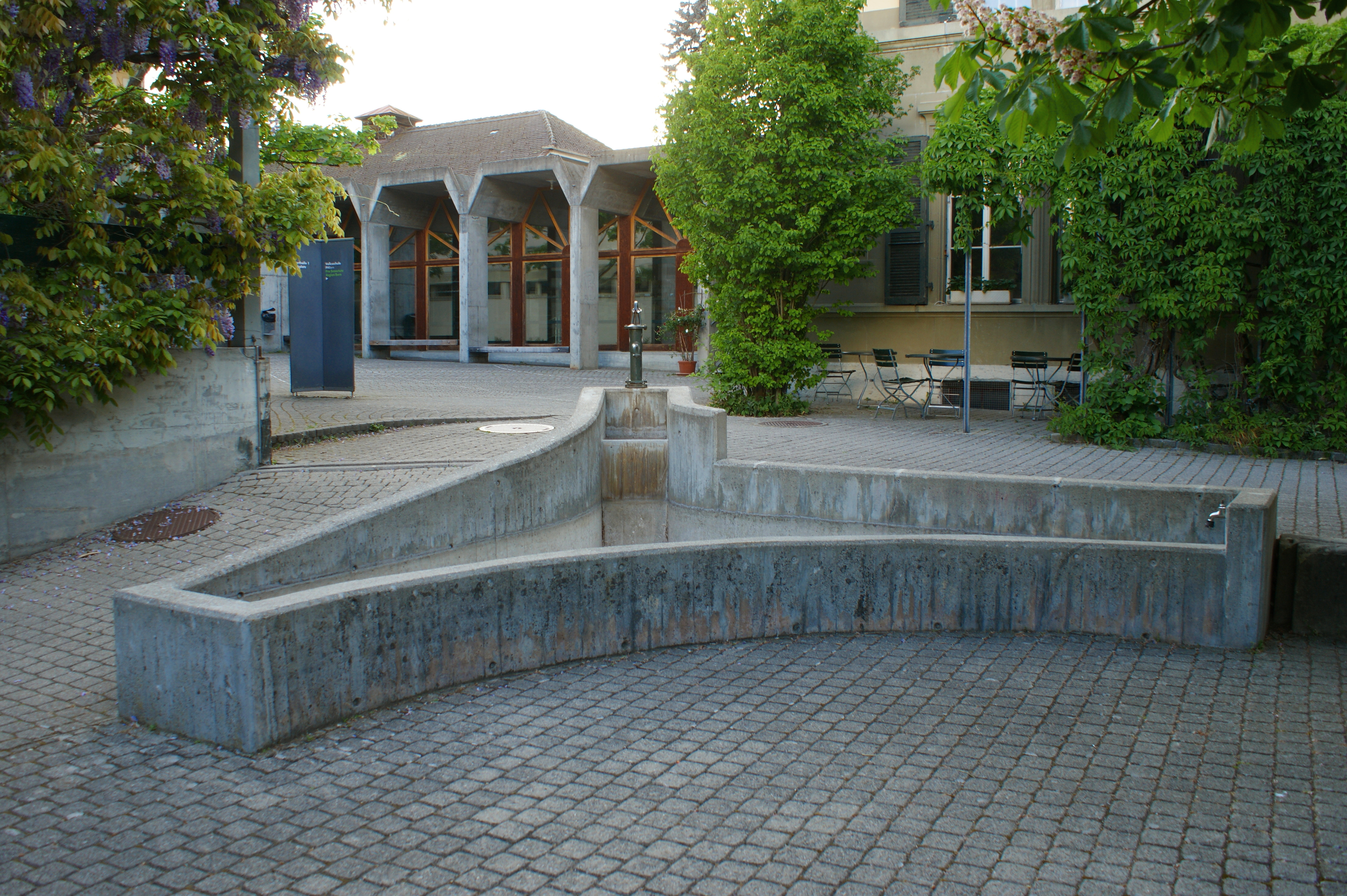 Pumpbrunnen Campus Muristalden